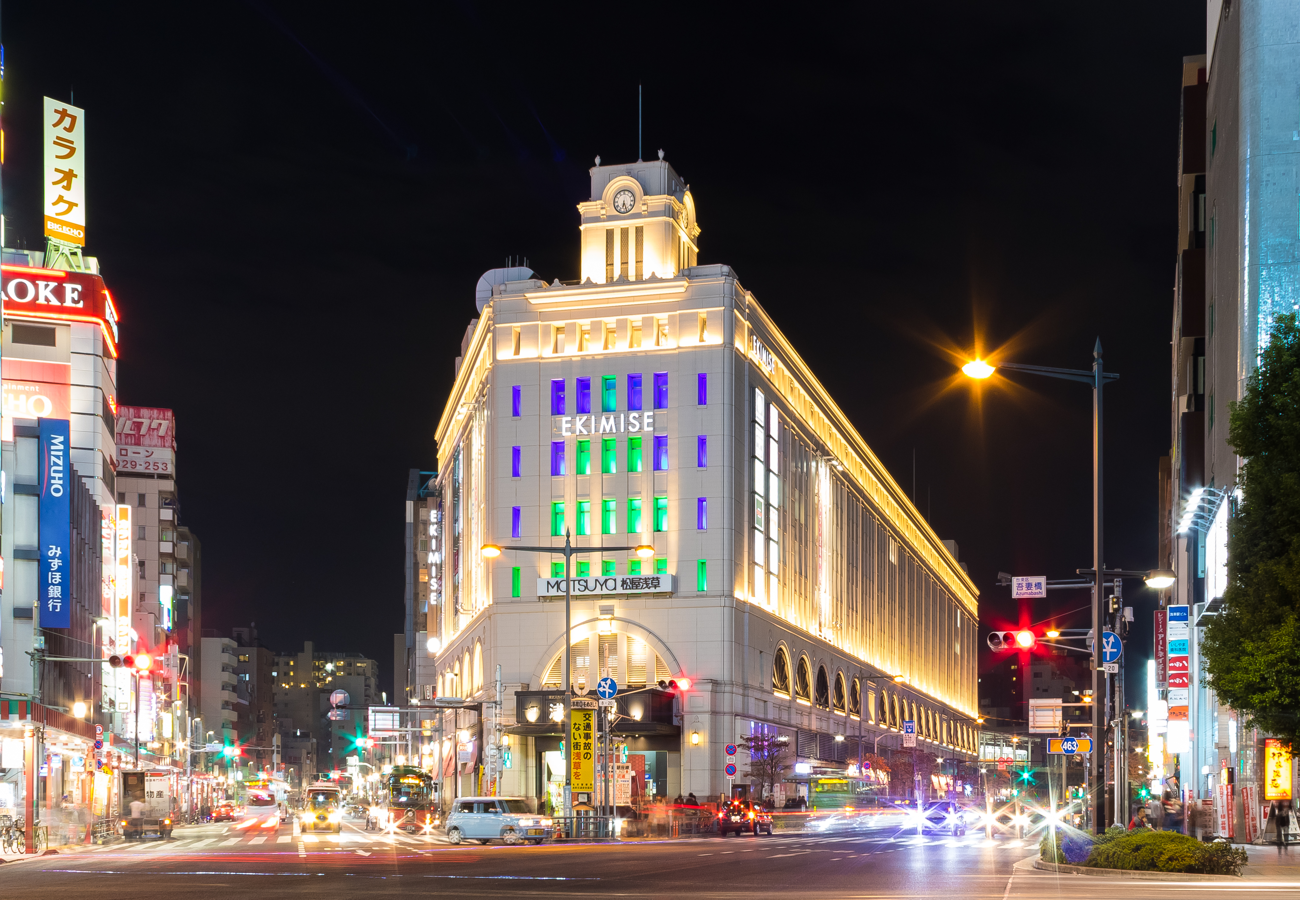 松屋浅草（浅草駅）のライトアップ。